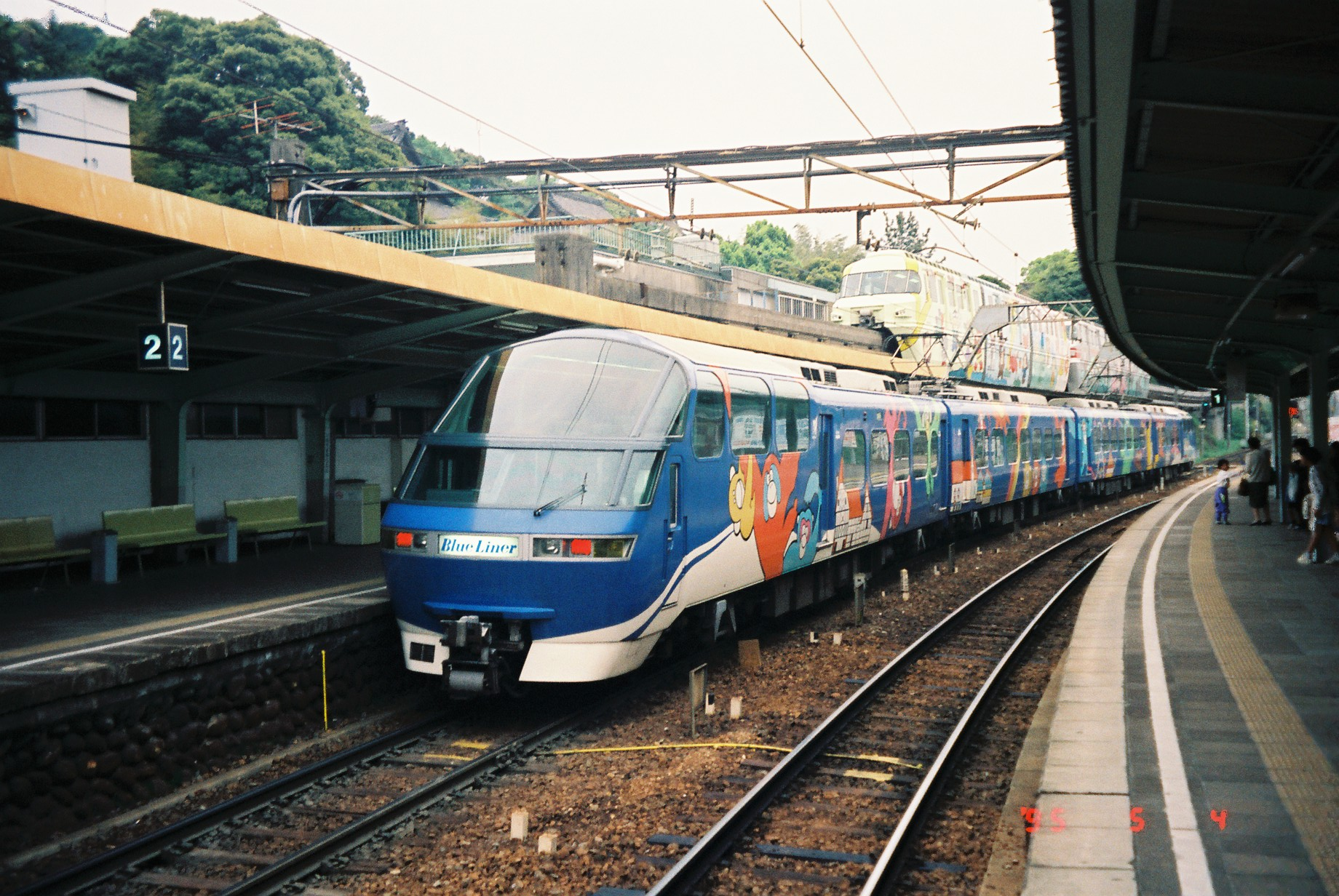 犬山遊園駅モノレールと